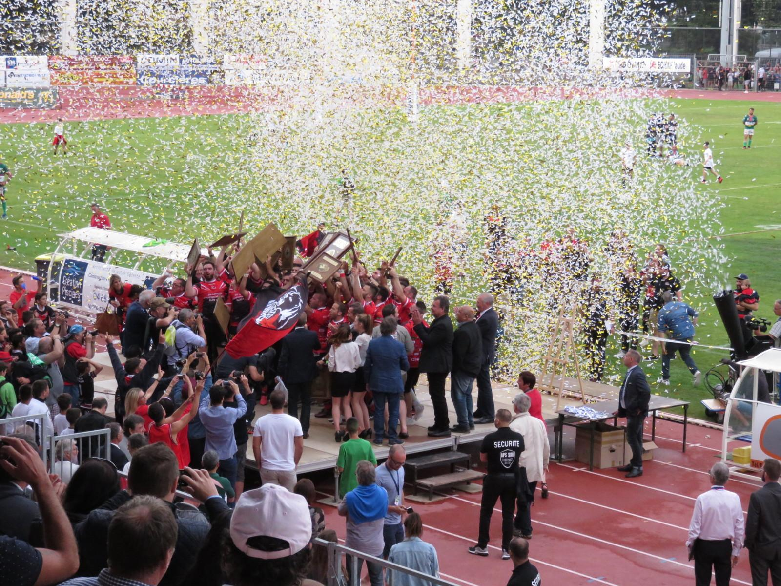 Célébration lors de la finale du Championnat de France de rugby à XIII 2017 à Narbonne entre Limoux et Lézignan.